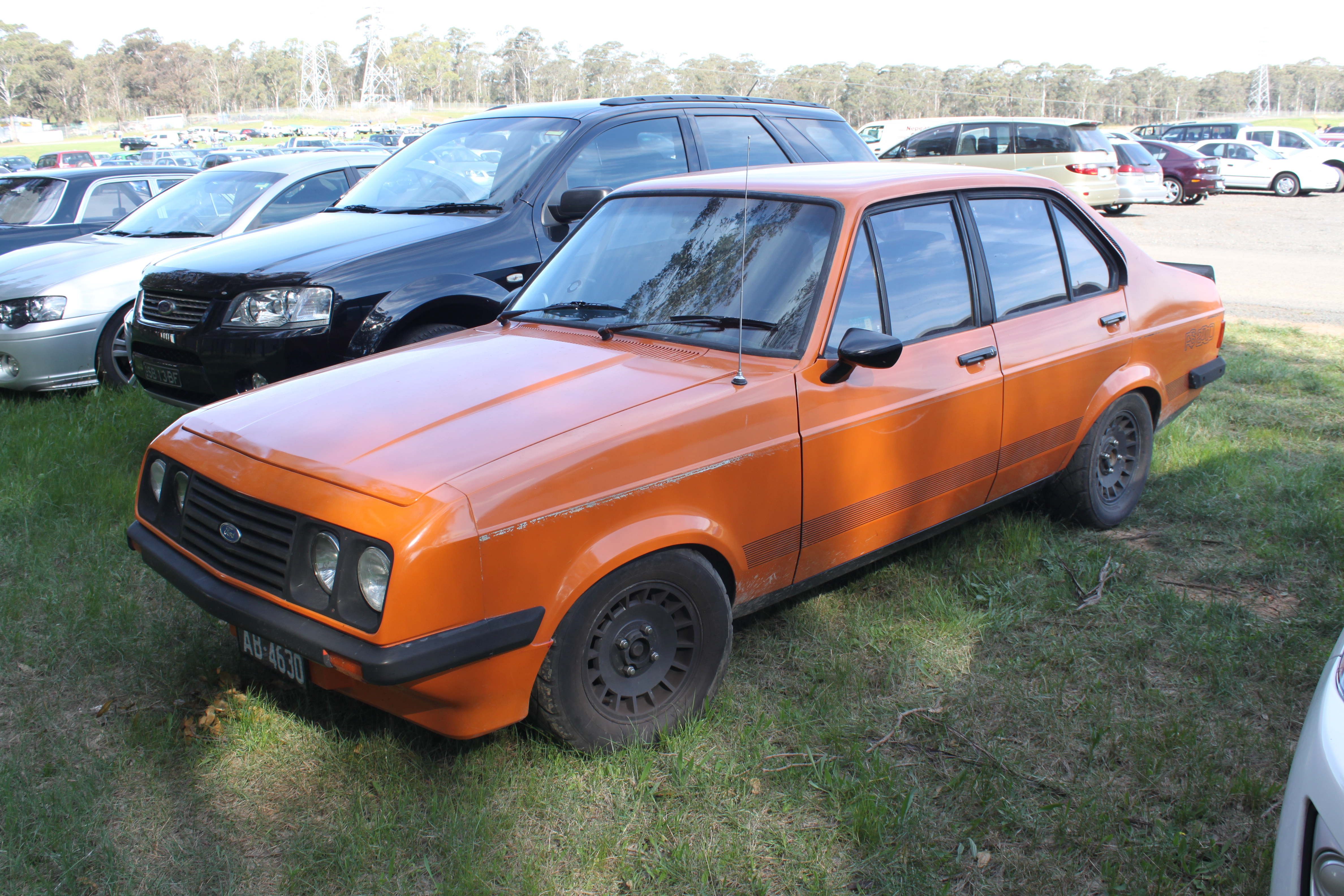 Ford Escort RS2000 Mk2